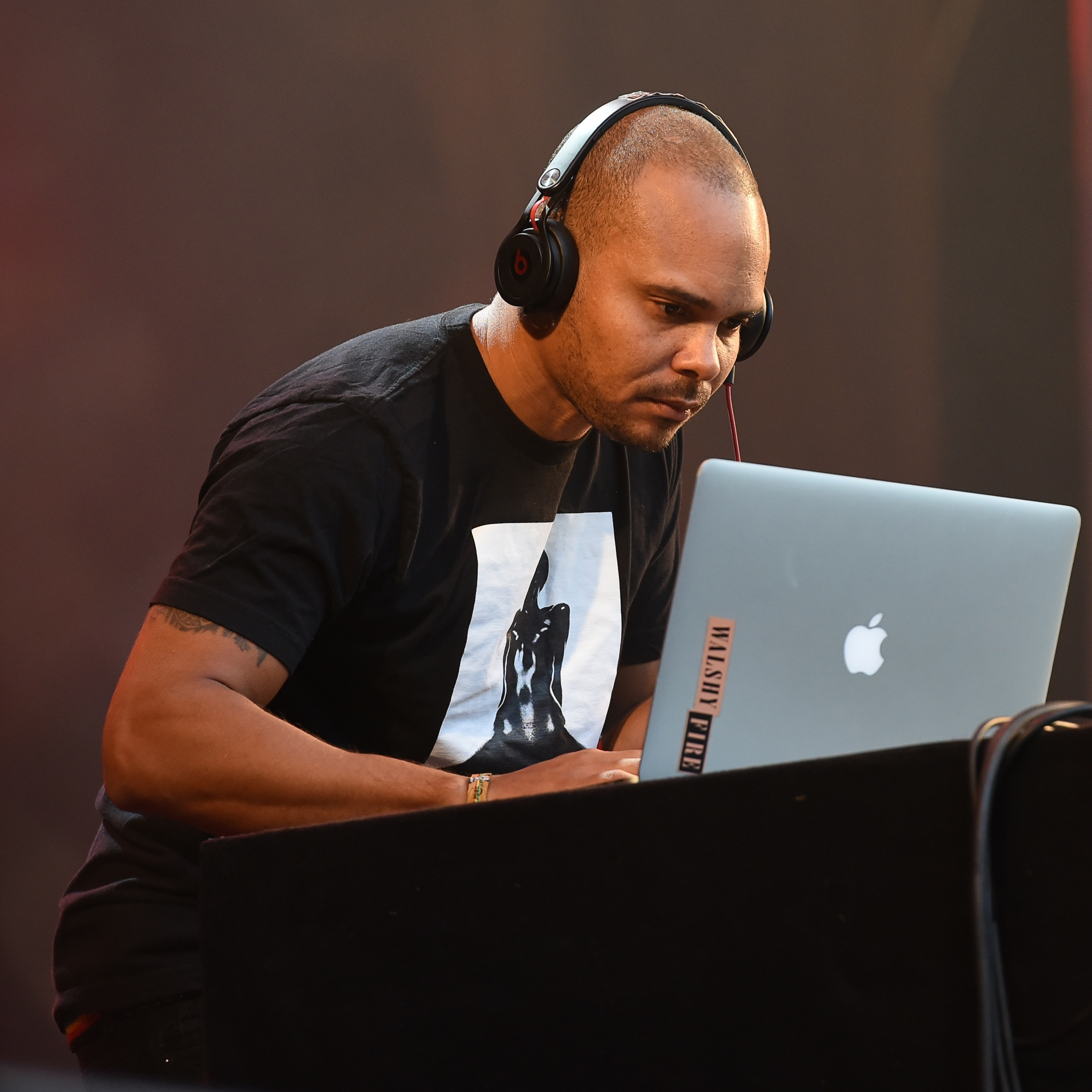 Walshy Fire beim Ruhr Reggae Summer in Mülheim